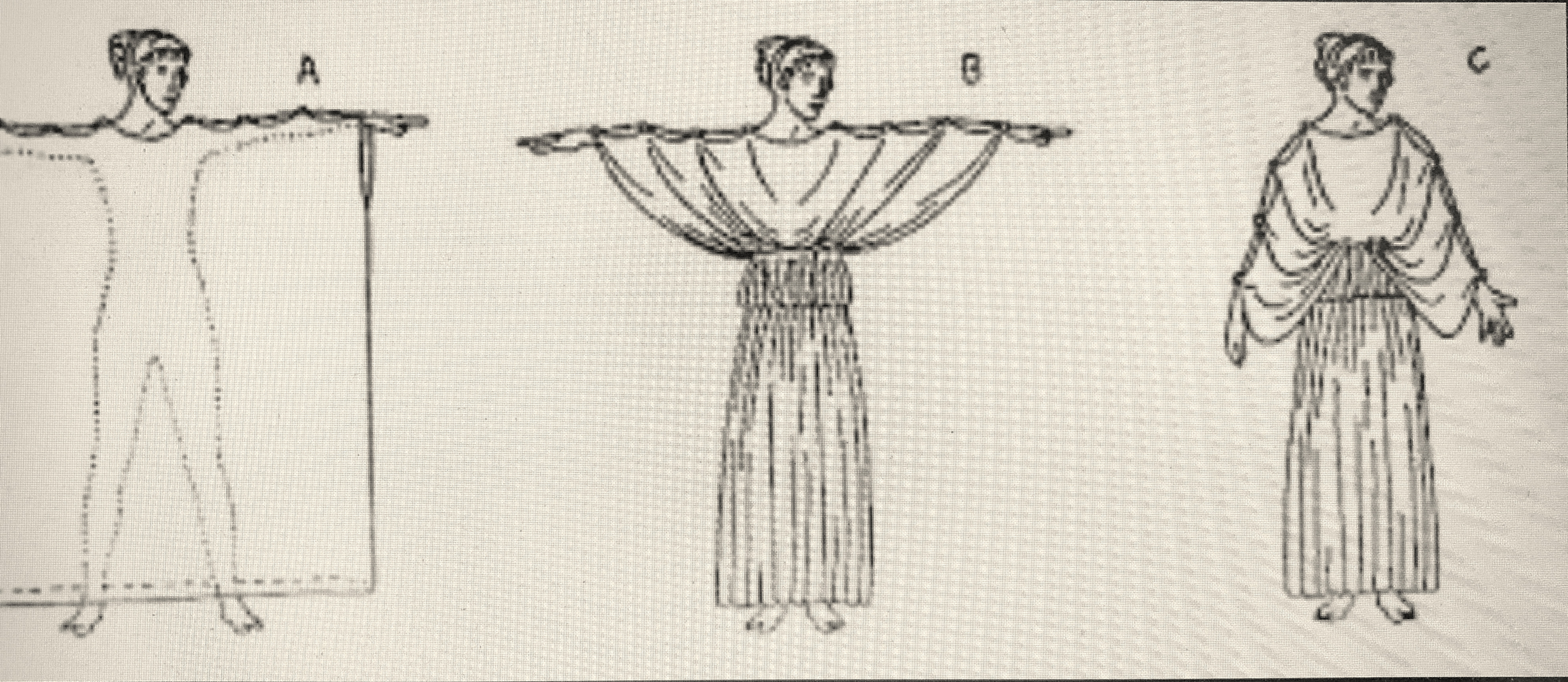 "fotografia d'un peple.jpg"